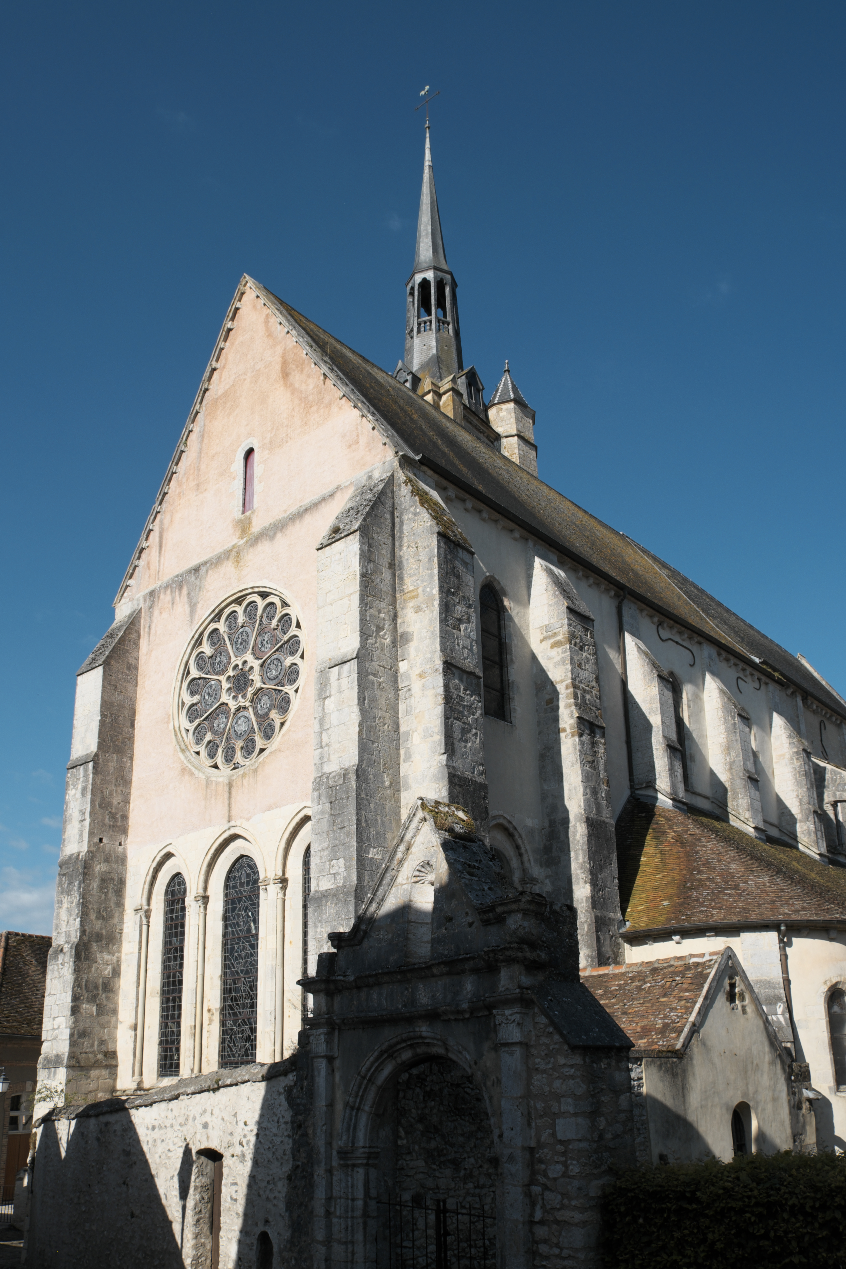 Katholische Kirche Notre-Dame-de-la-Nativité (Mariä Geburt) in Donnemarie-Dontilly im Département Seine-et-Marne (Île-de-France/Frankreich)